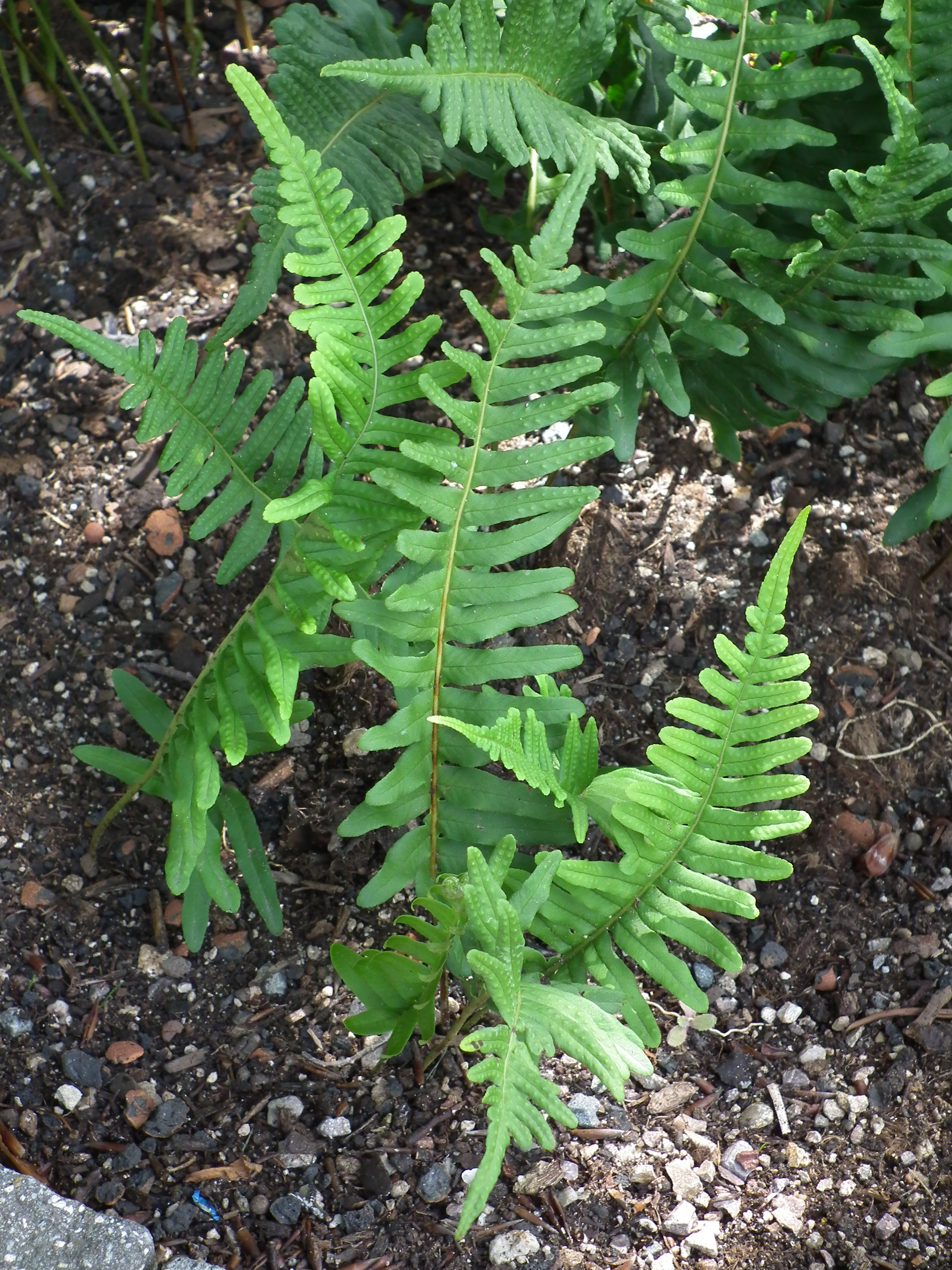 Gewöhnlicher Tüpfelfarn (Polypodium vulgare), fotografiert in Heidelberg, Baden-Württemberg, Deutschland.